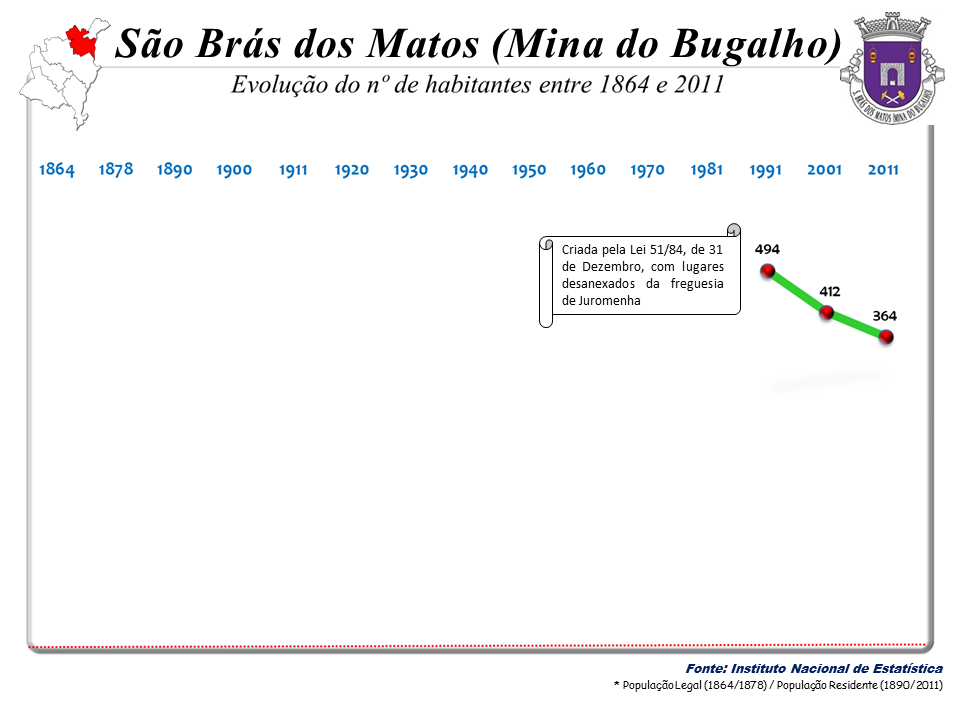 Censos 1864/2011